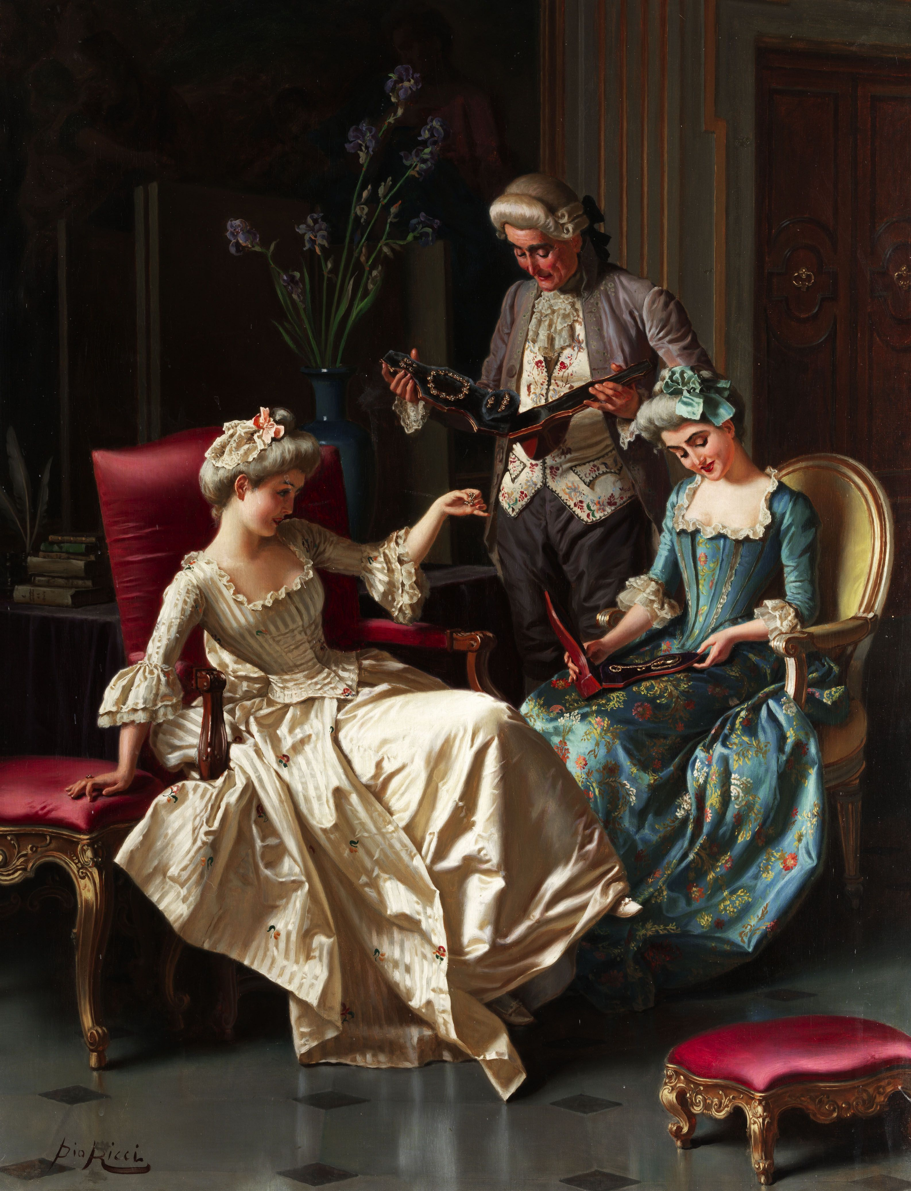 Das bewunderte Geschenk.